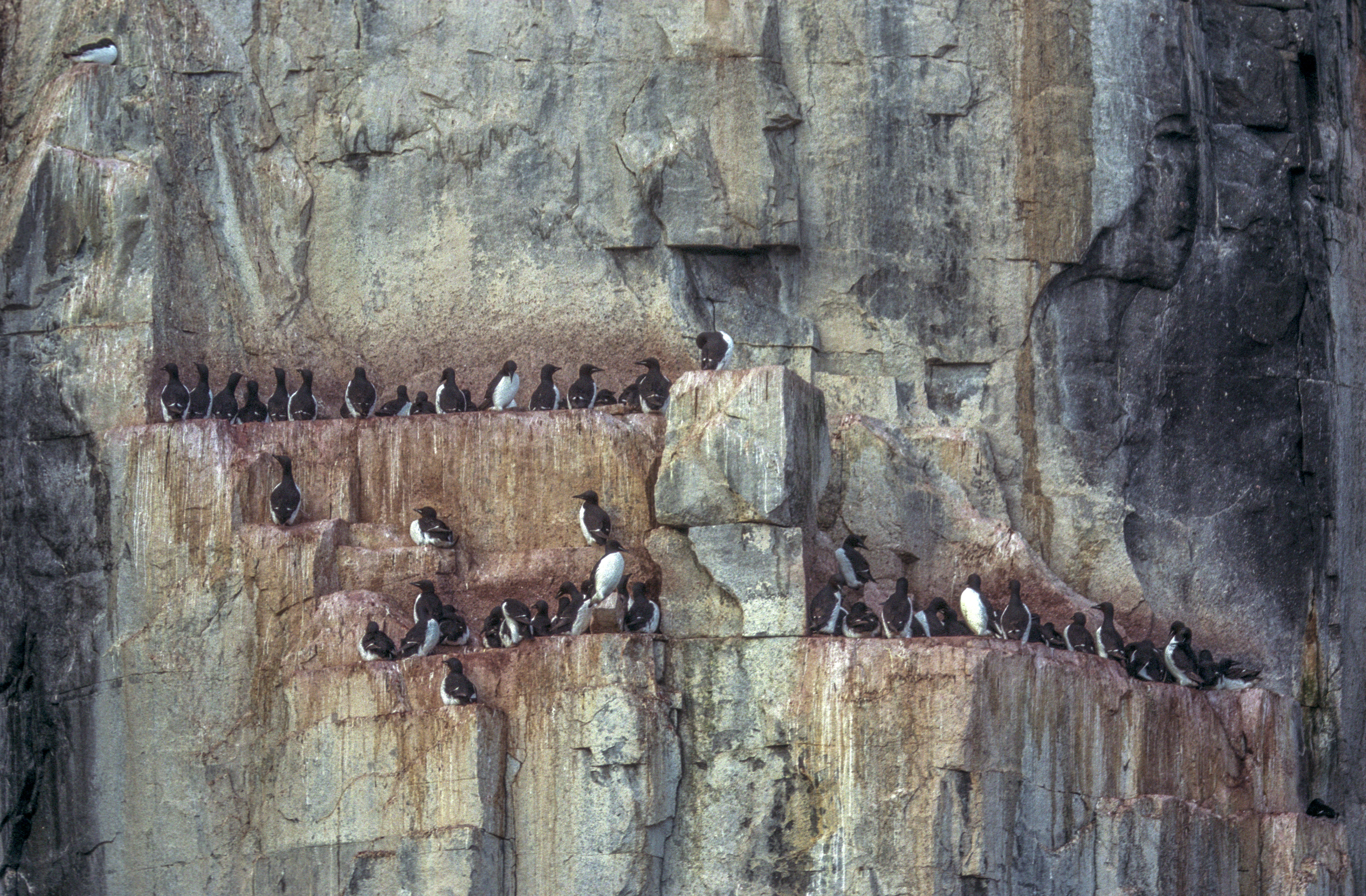 Spitsbergen, Alkefjellet